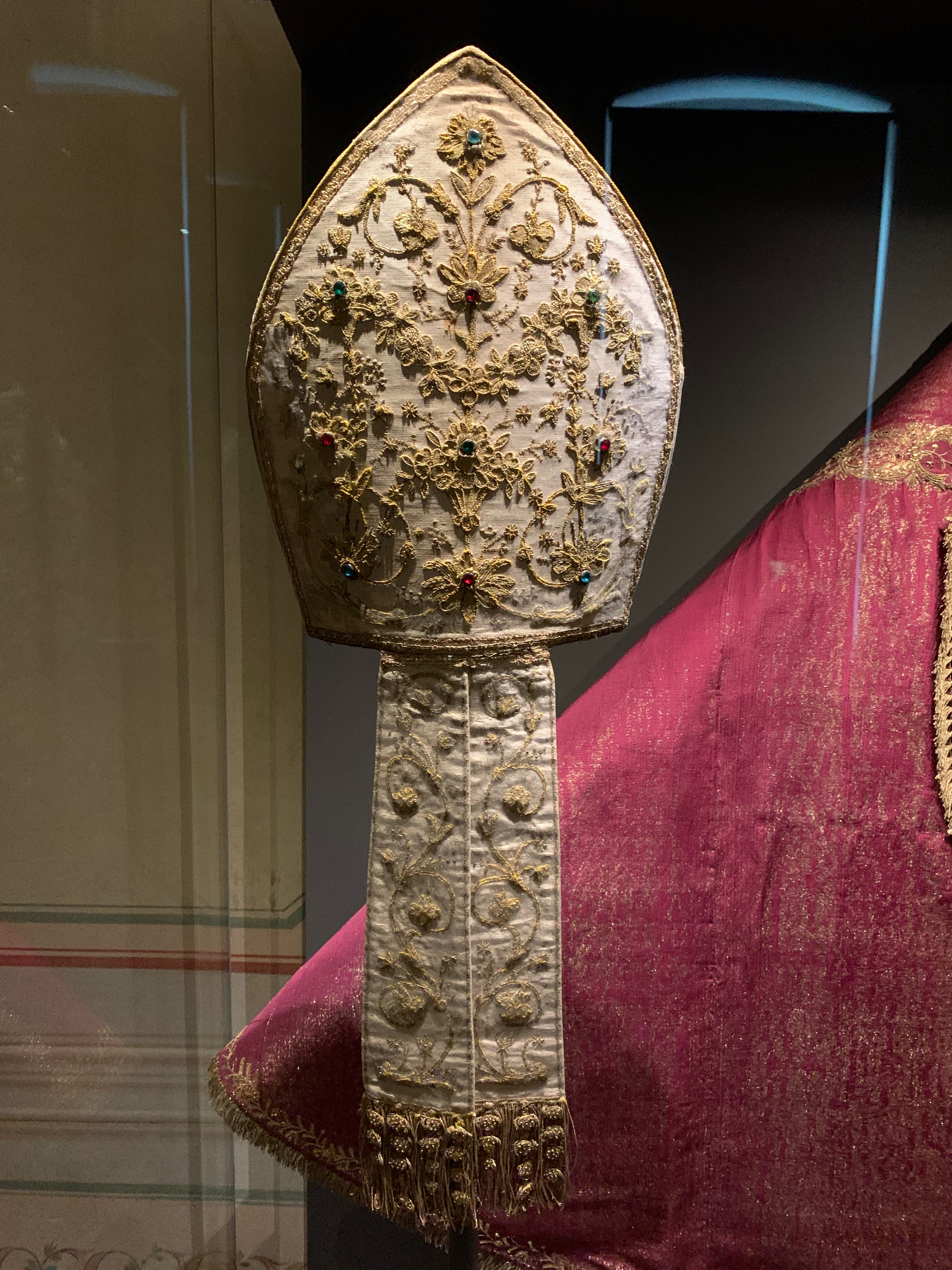 Mitria in taffetas laminato e ricamato del primo quarto del XIX secolo di manifattura romana proveniente dalla cattedrale ed esposto al nuovo museo dell'Opera del Duomo di Pisa